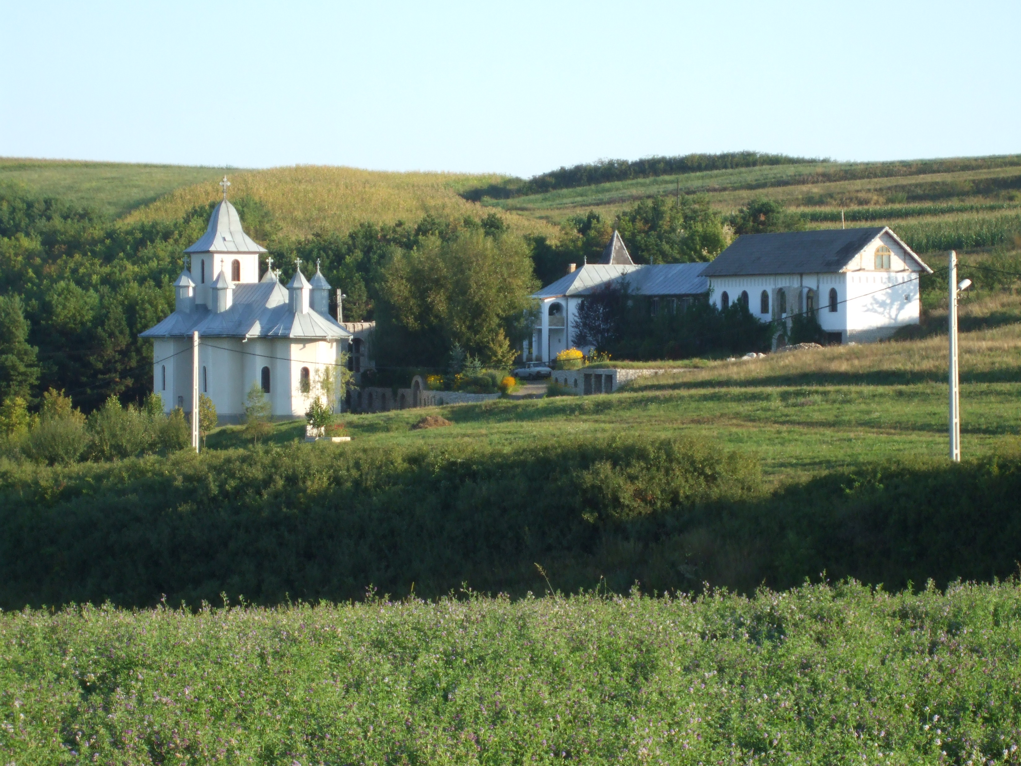 Mănăstirea din Soporul de Câmpie, com.Frata, jud.Cluj